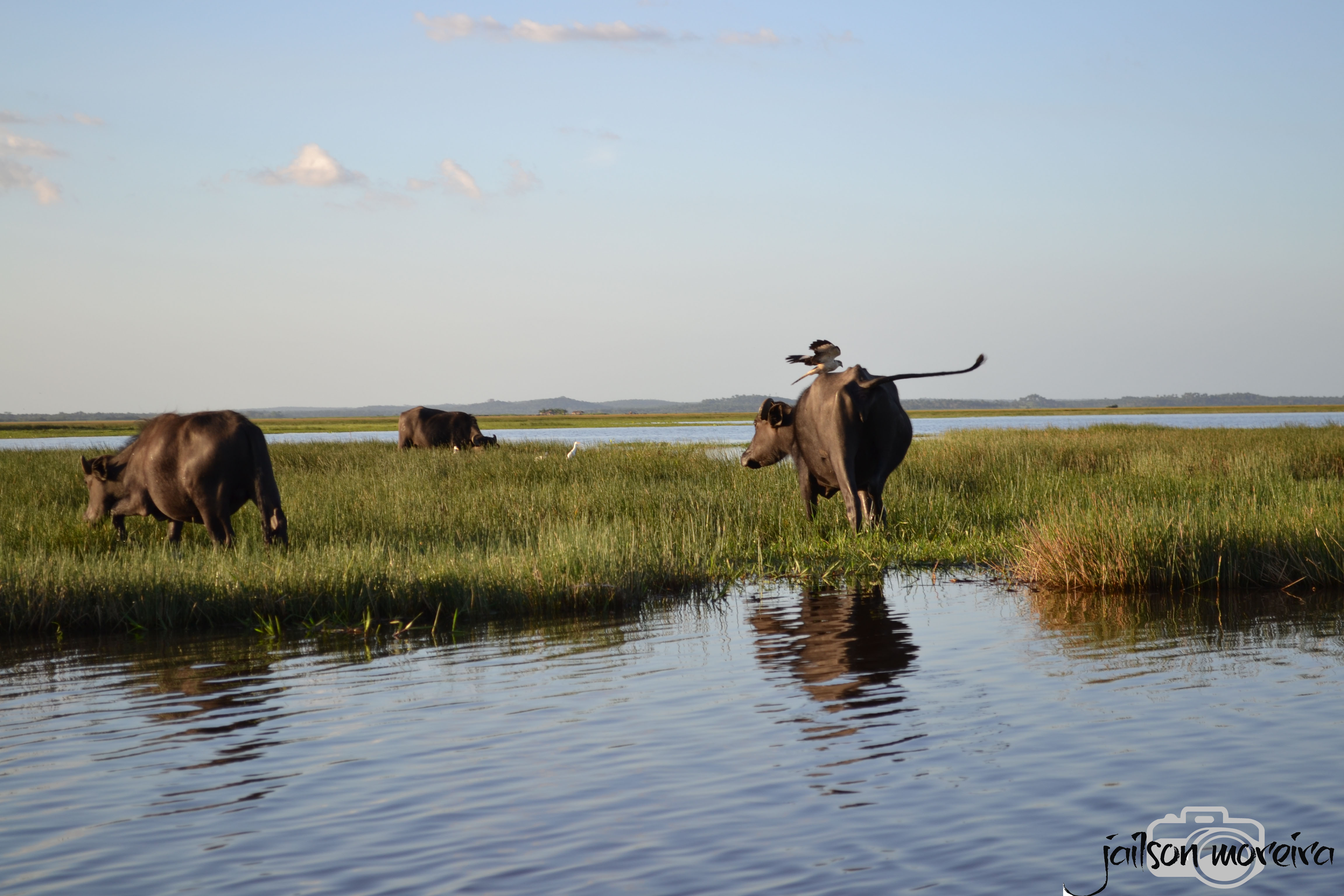 Criação de búfalos (Rio Pericumã)